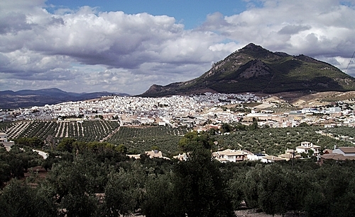 Rute desde el cerro de la higuera.